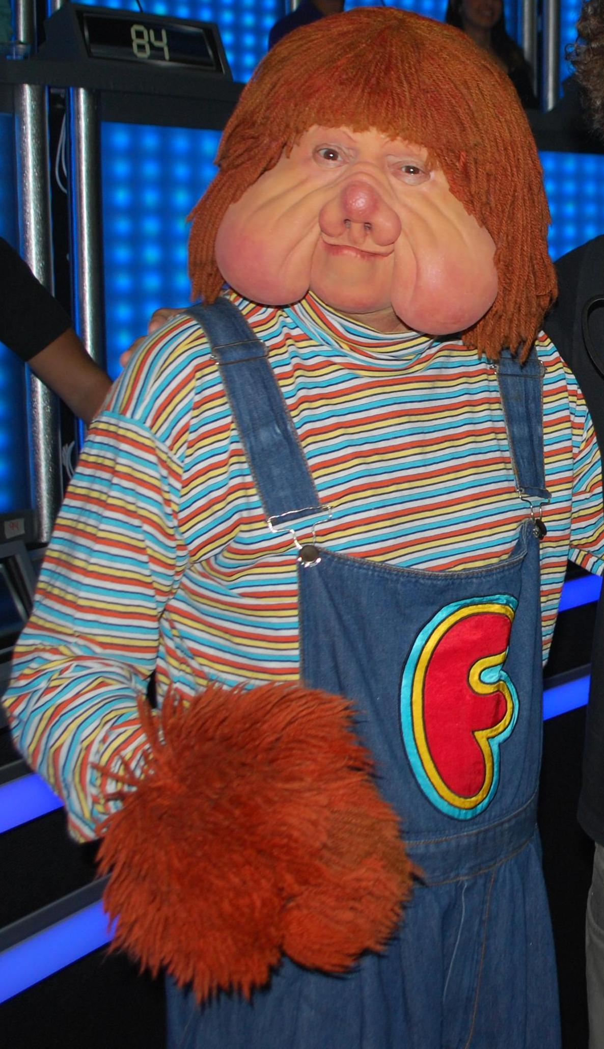 Personagem Fofão no set do programa Um Contra Cem.